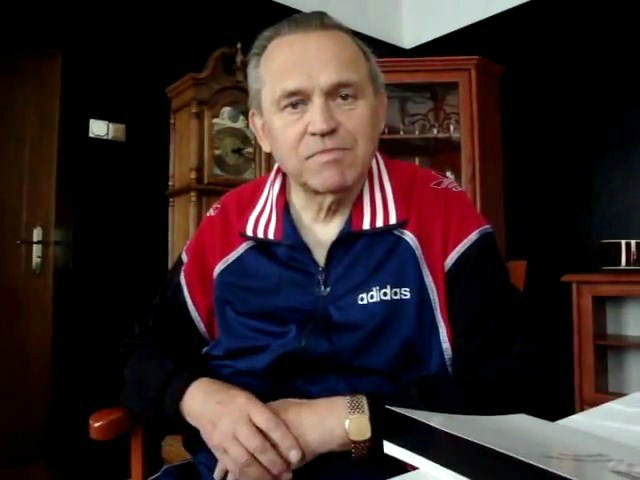 Ks. Henryk Jankowski w plebanii gdańskiego kościoła św. Brygidy.